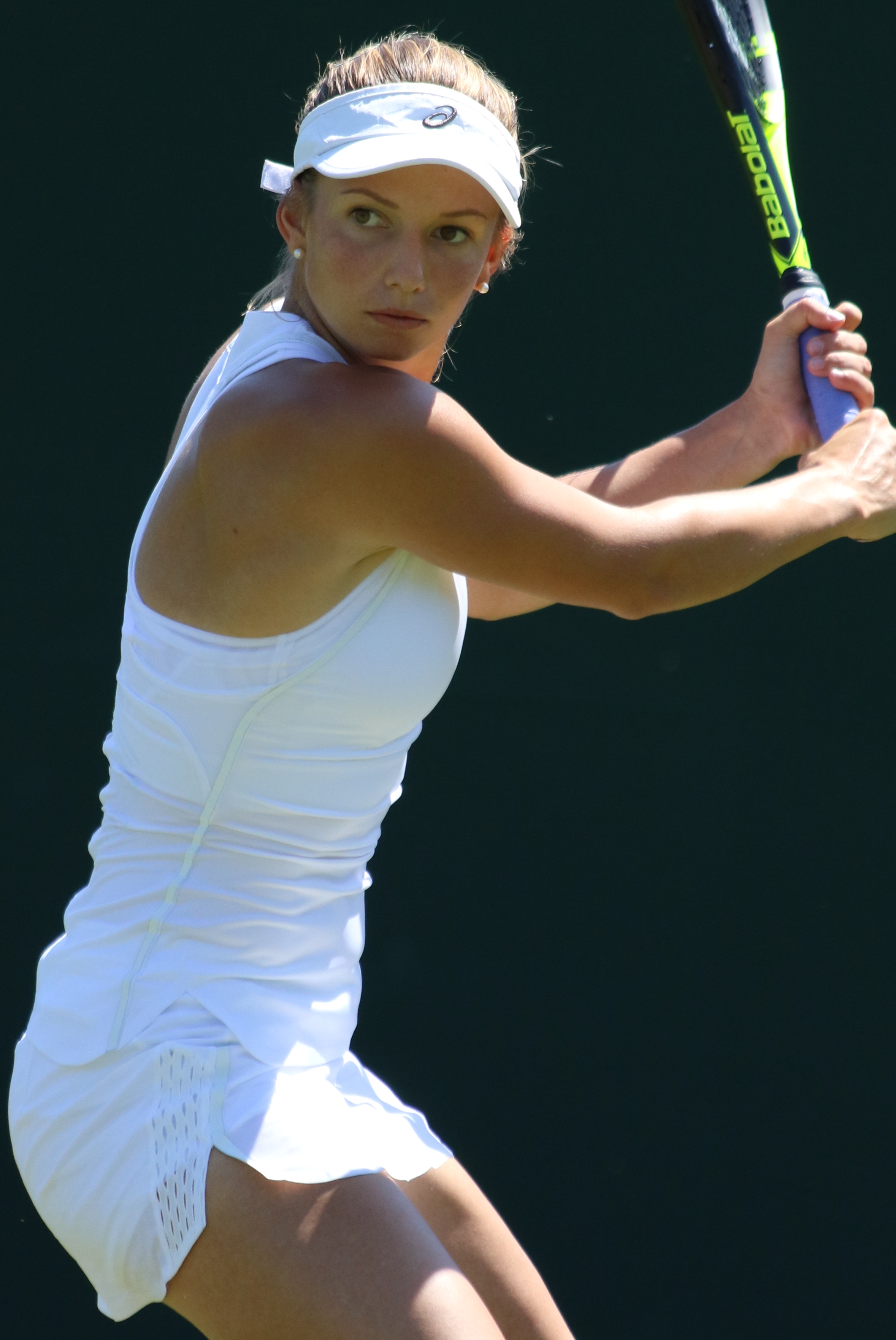 Haas WMQ18 (18)